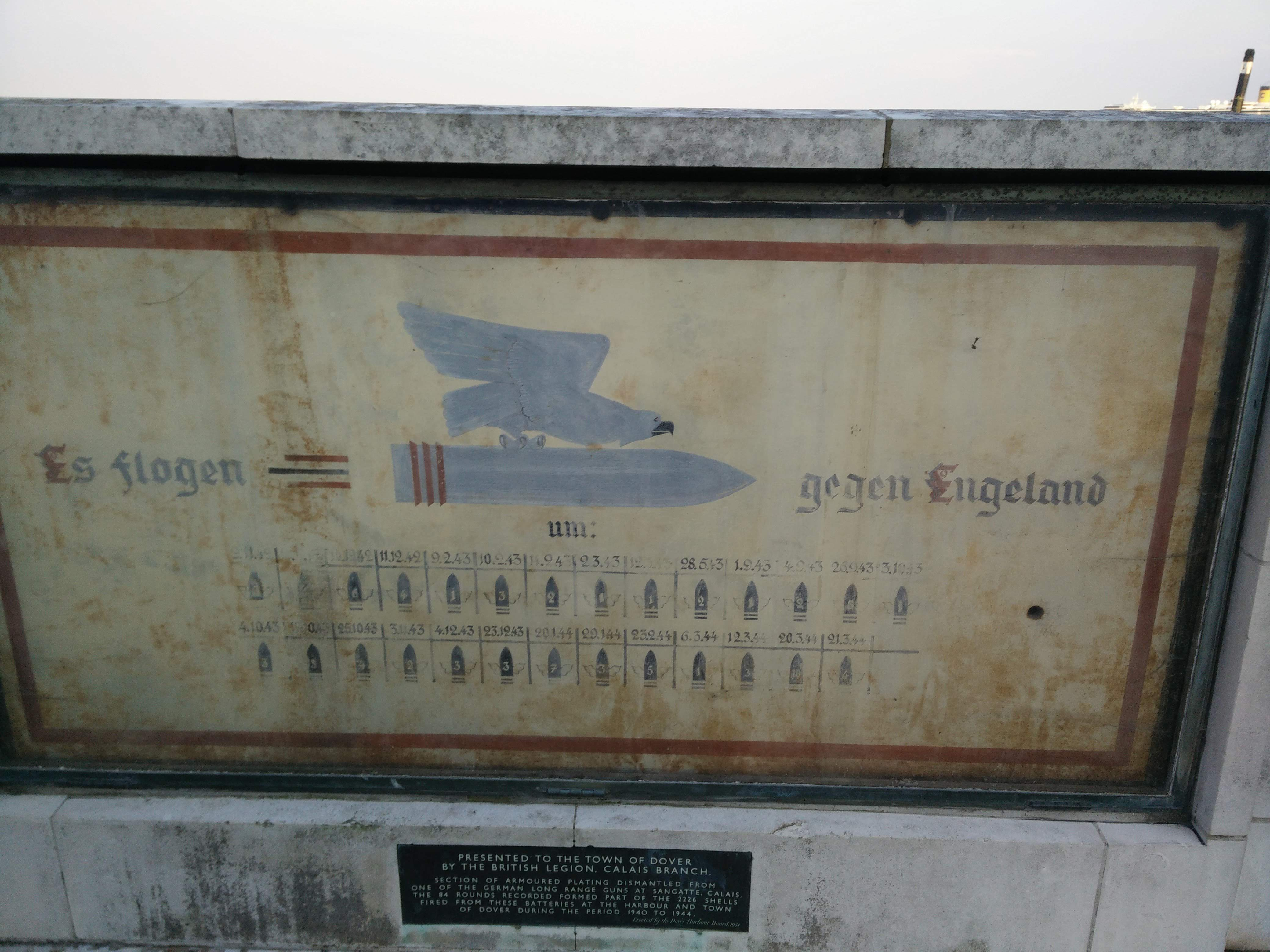 Schild mit dem Schriftzug "Es flogen (Bild von Bombe) gegen Endland"